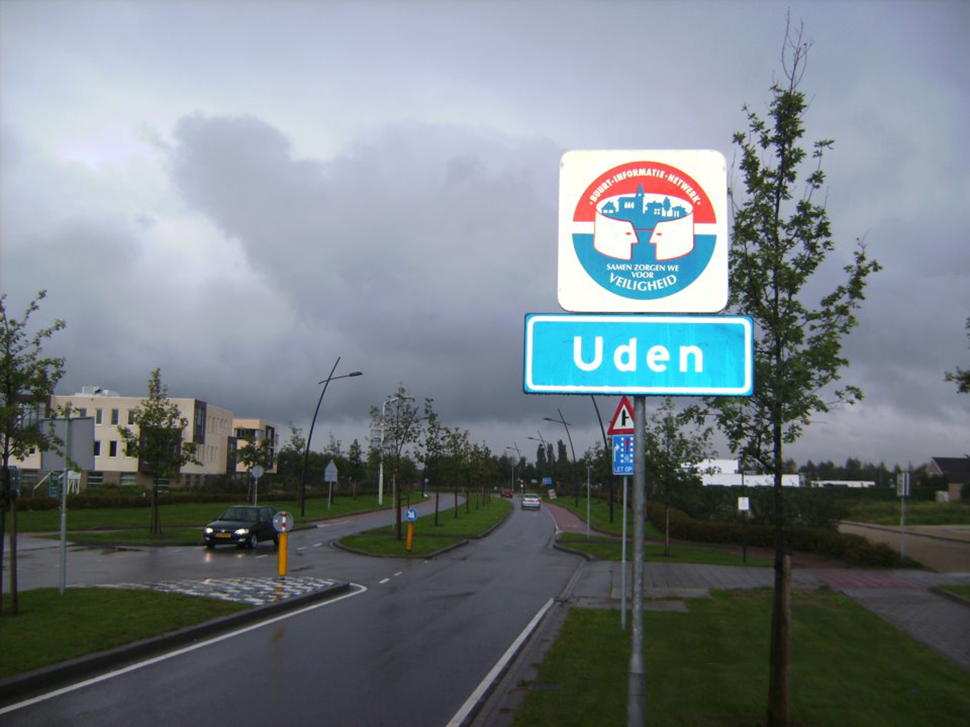 Dit bord staat aan het begin van de BIN wijk Uden Zuid